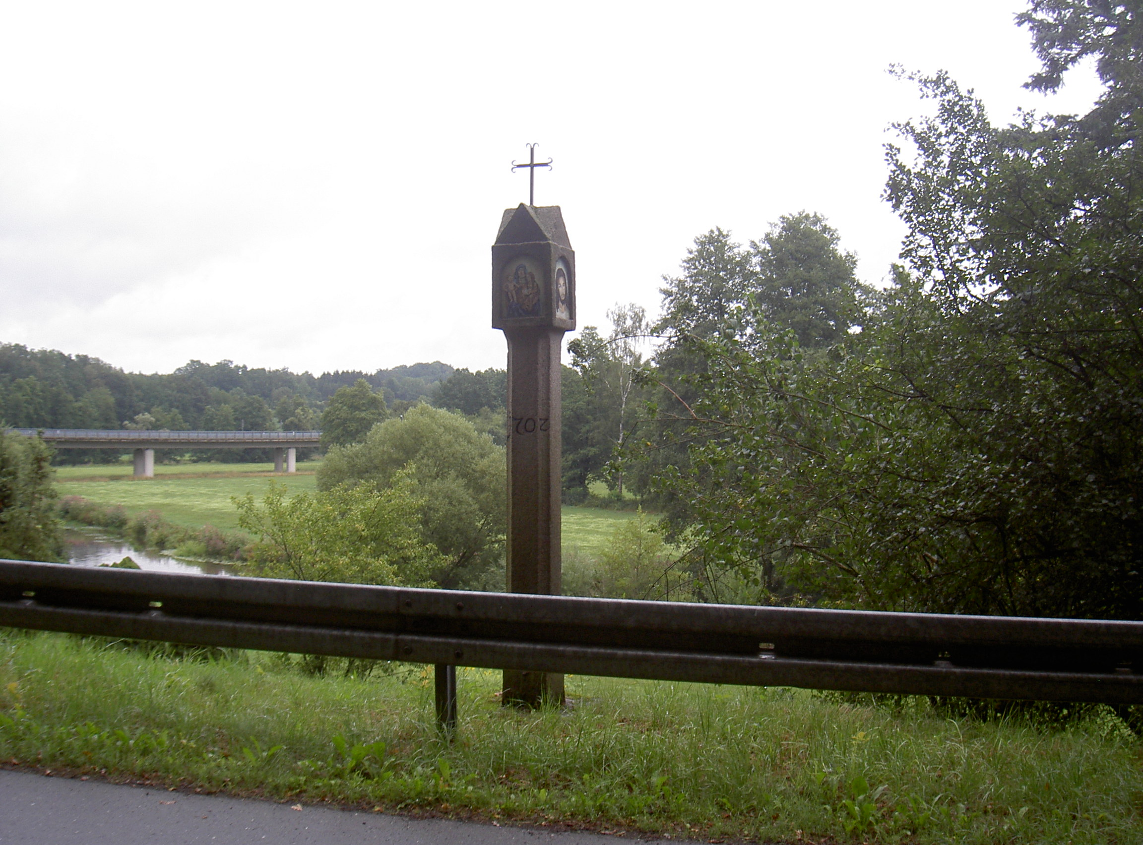 Schaftbildstock (Radschinmühle)